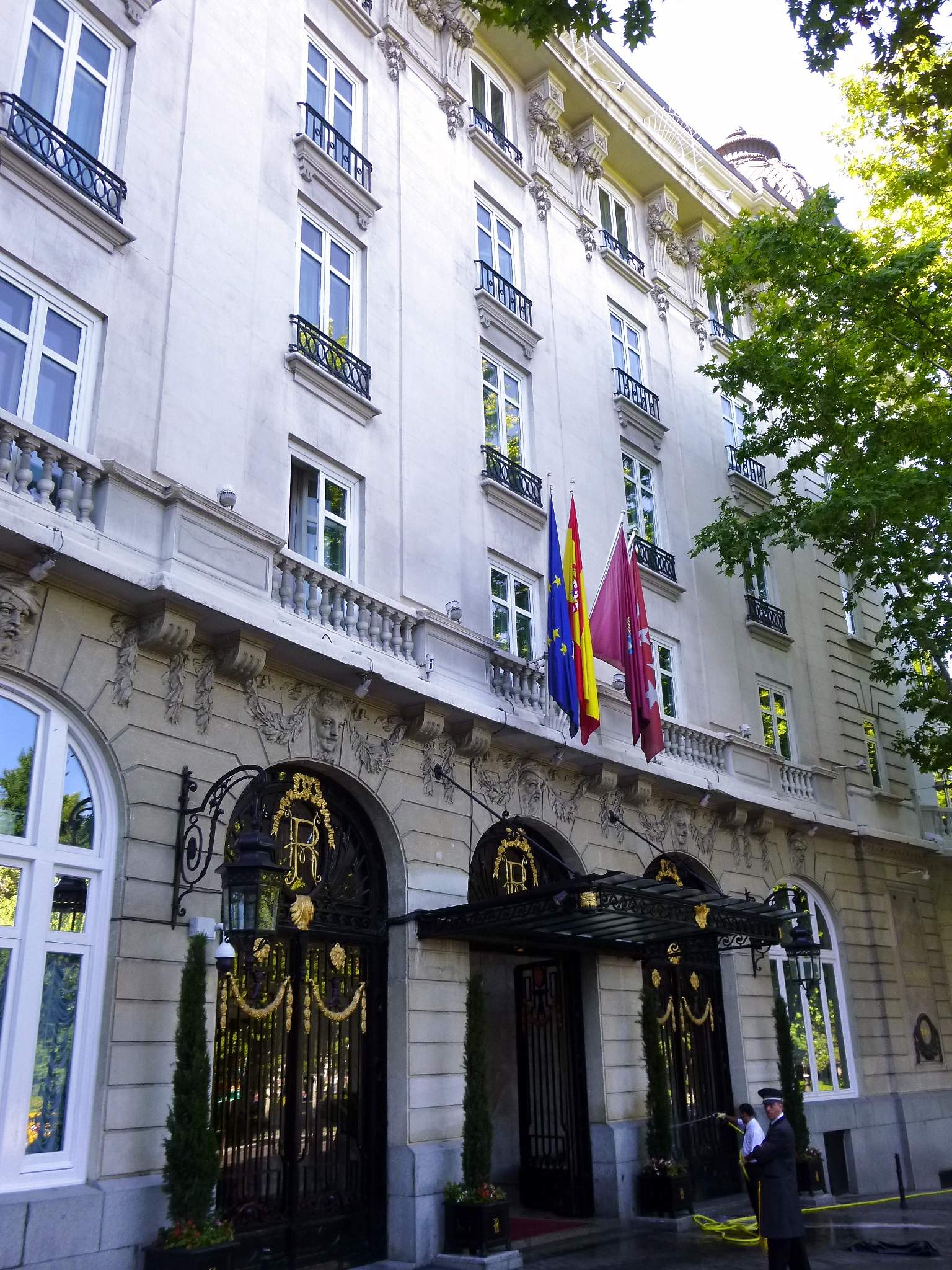 Madrid - Ritz Hotel